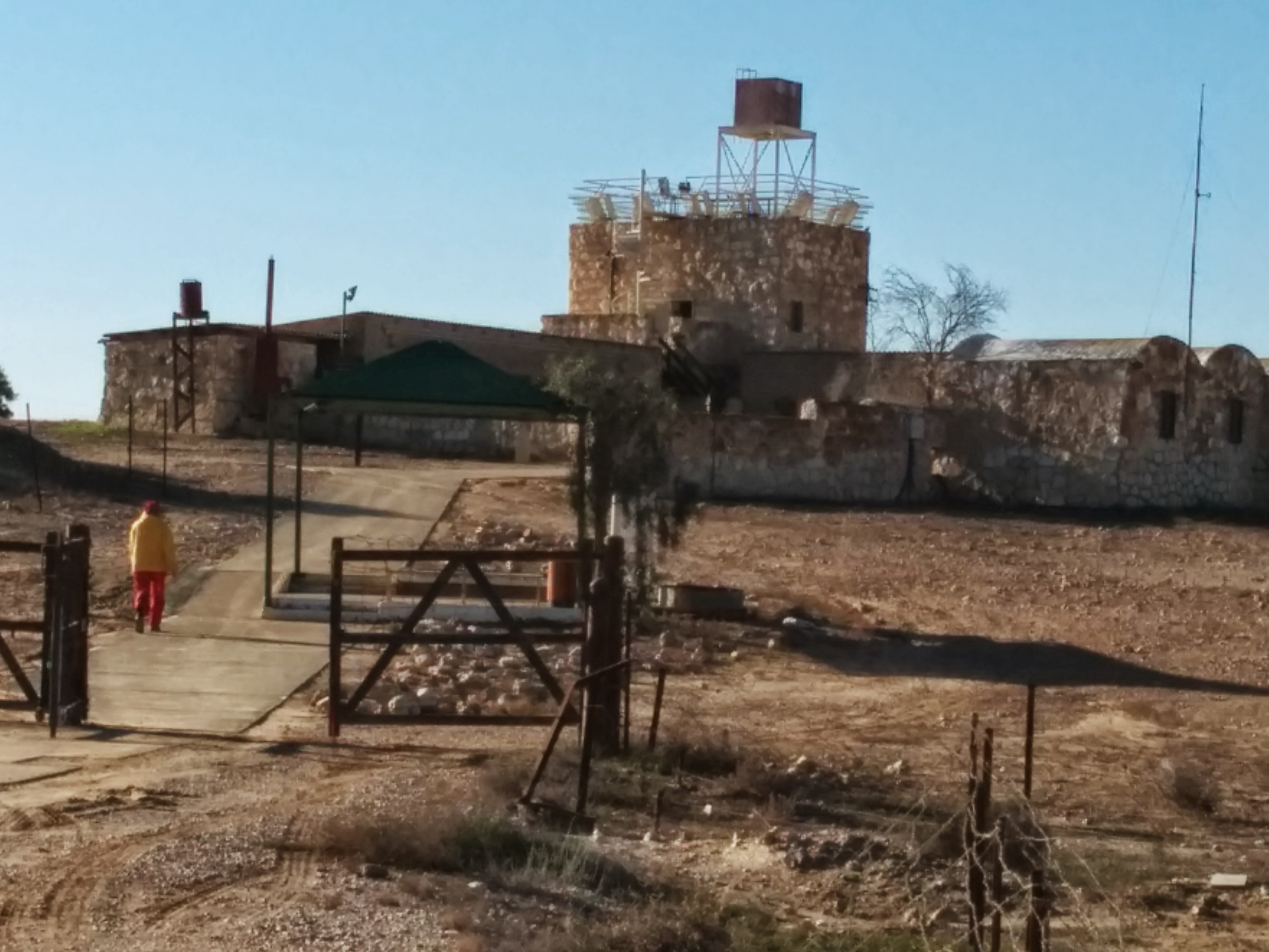 Mitzpe Revivim, Negev מצפה רביבים